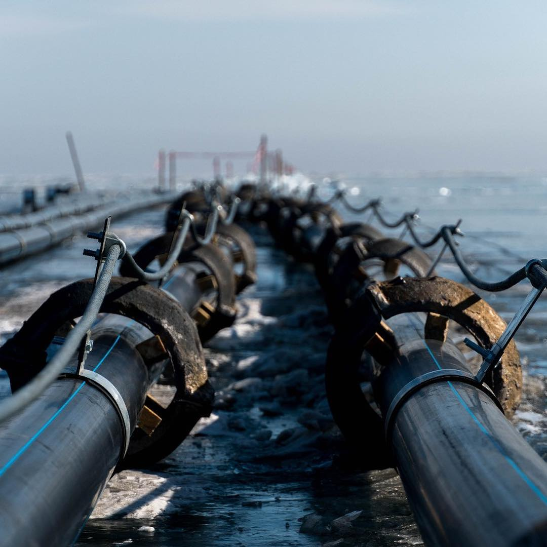 Фотография с места строительства завода в поселке Култук